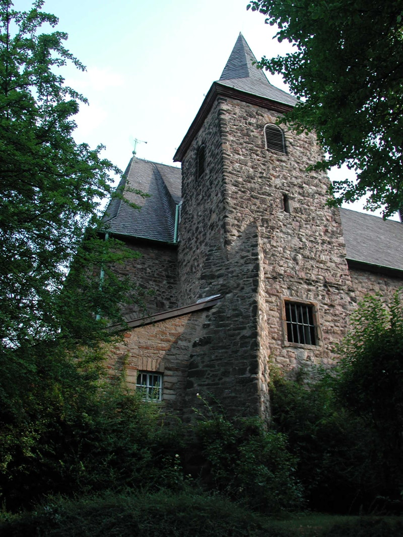 Stiftskirche in Essen-Stoppenberg,Turm